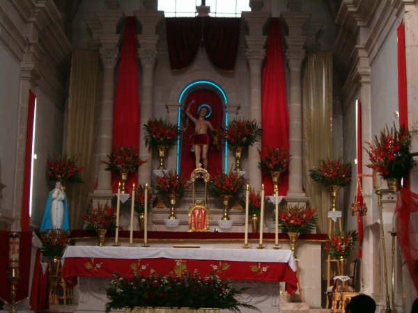 San Sebastian Martir